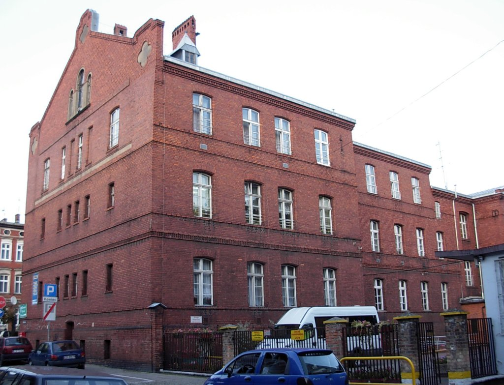 Ośrodek Szkolno-Wychowawczy im. Louisa Braille’a w Bydgoszczy, budynek 1870-1872, skrzydła boczne 1906-1909